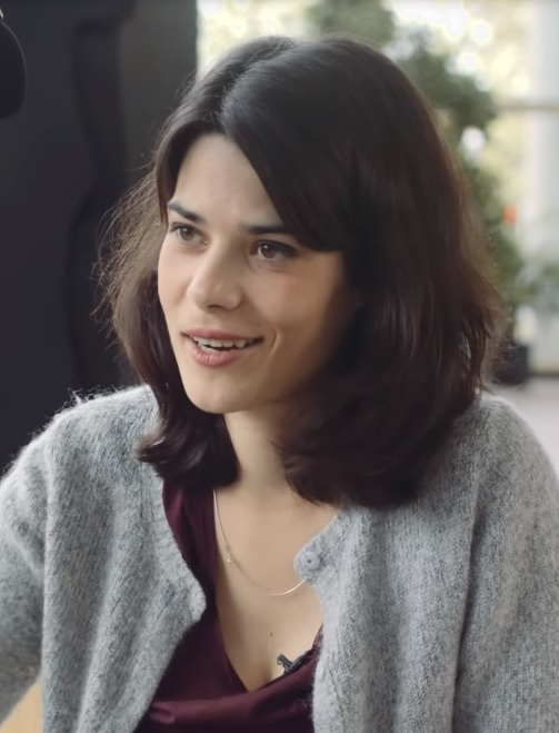 La diputada de Unidas Podemos Sofía Castañón entrevista en profundidad a 12 candidatas. En esta ocasión, conoce a Isa Serra, candidata de Unidas Podemos a la Comunidad de Madrid..